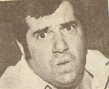 Humberto Ortiz actor argentino (el "Coquito" de "Piluso y Coquito"